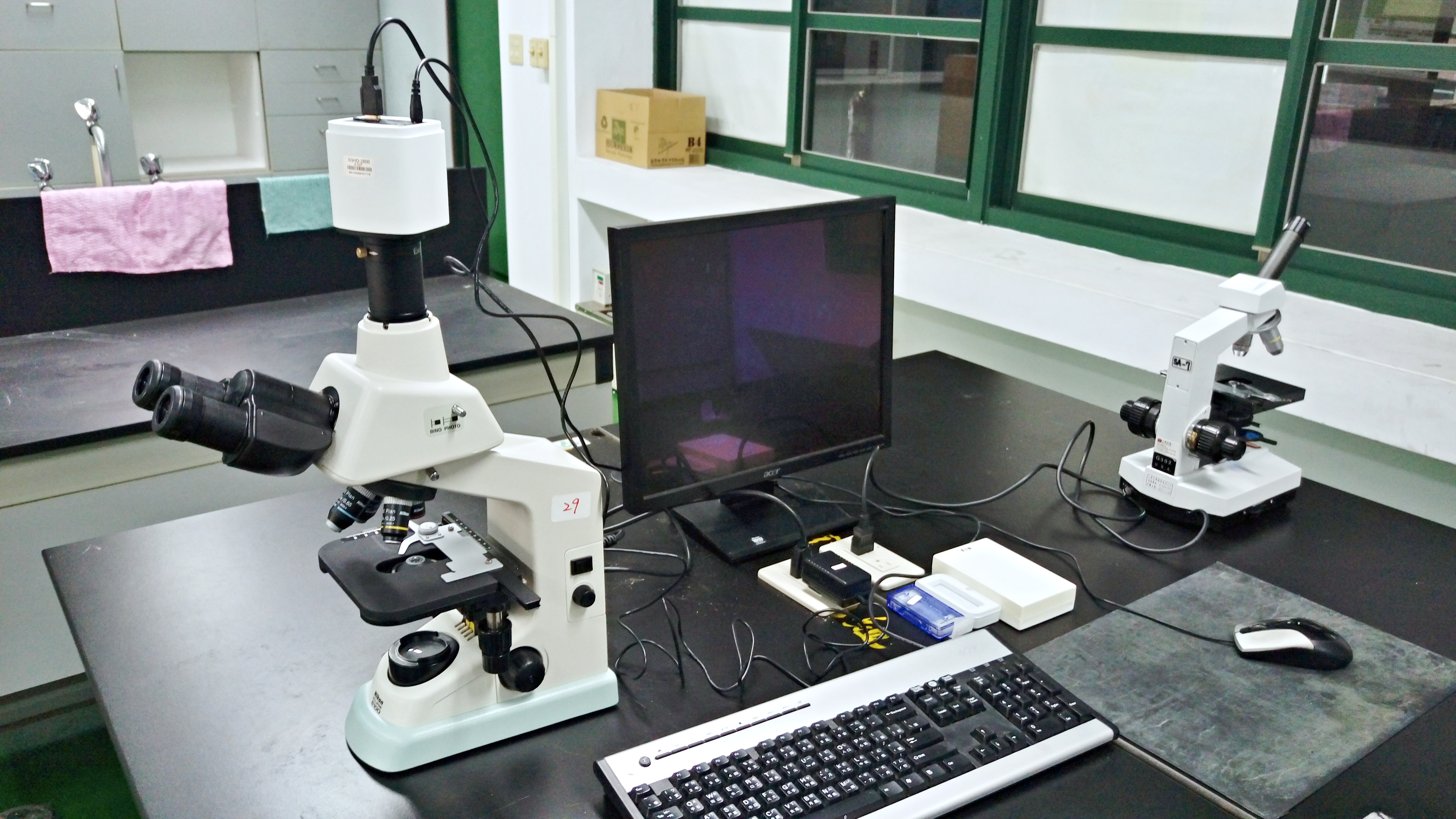 麗山高中的生物科顯微中心，整間實驗室配有九組設備